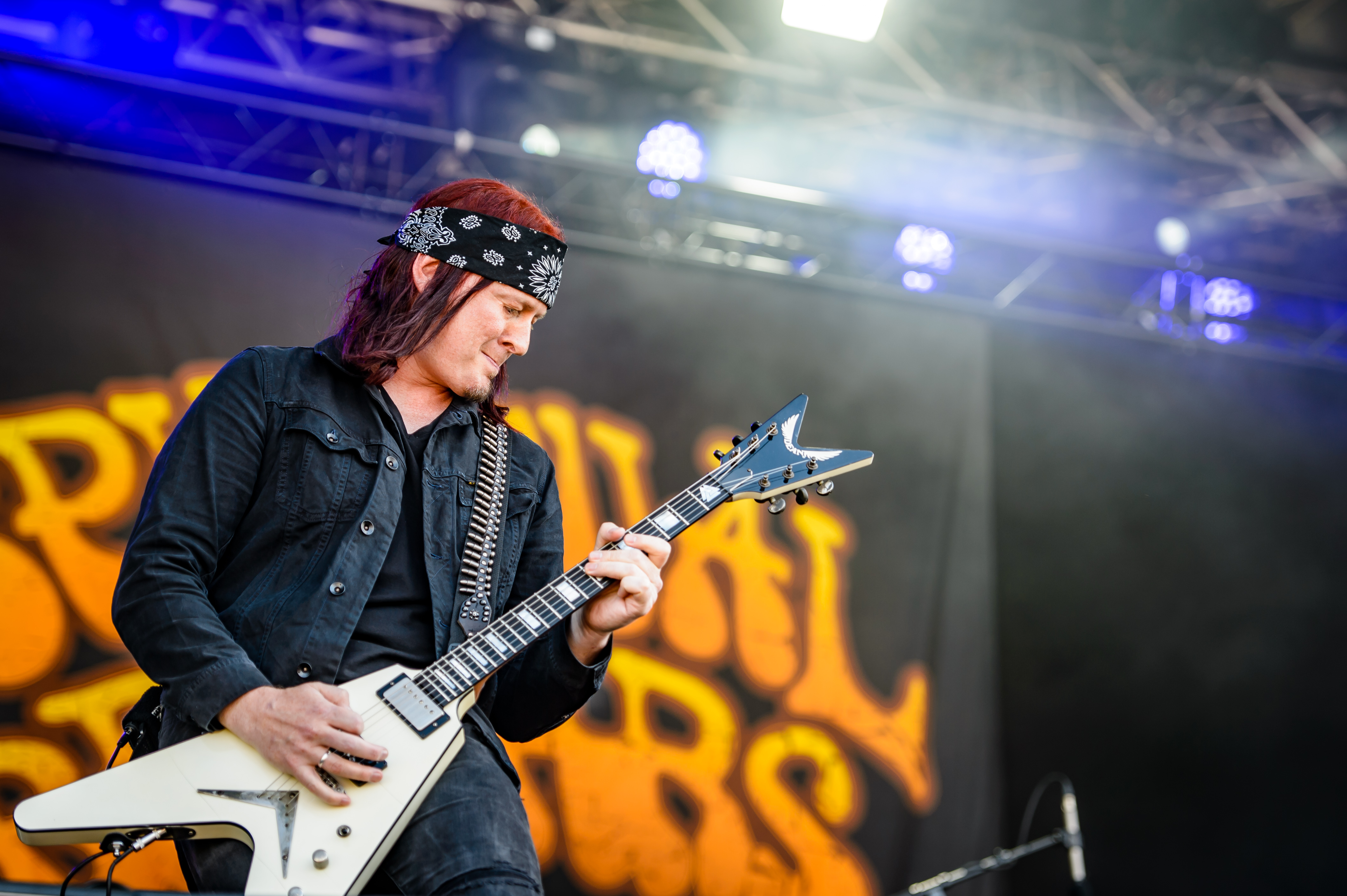 'RockHarz Open Air 2016; Ballenstedt': 'Spiritual Beggars'